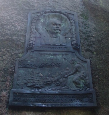 Zeppelin-Gedenkstein bei Bad Iburg von Bildhauer Heinrich Wulfertange (1854-1924).